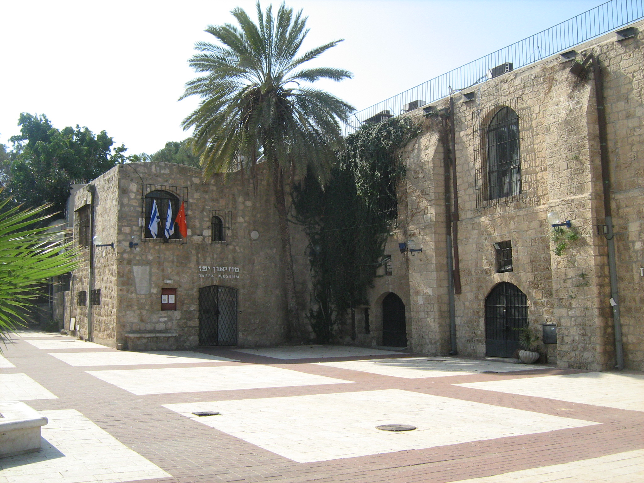 הסראיה הישנה ביפו